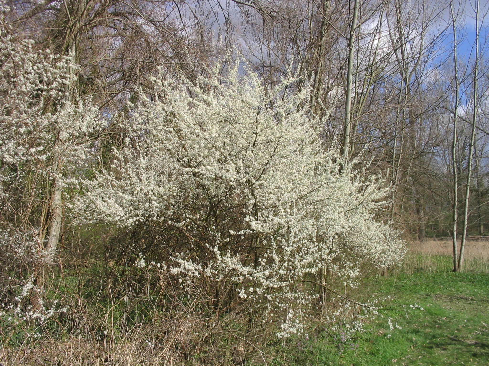 Blühender Schlehenstrauch, Prunus spinosa, aufgenommen am 04.04.2004 Fotograf: Dr. Hagen Graebner